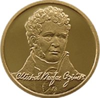 Беларуская (тарашкевіца): Памятная манэта М. Агінскі